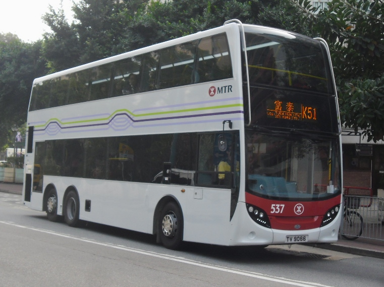 中文（香港）: 港鐵巴士K51線，正駛經青山公路近三聖邨前往富泰